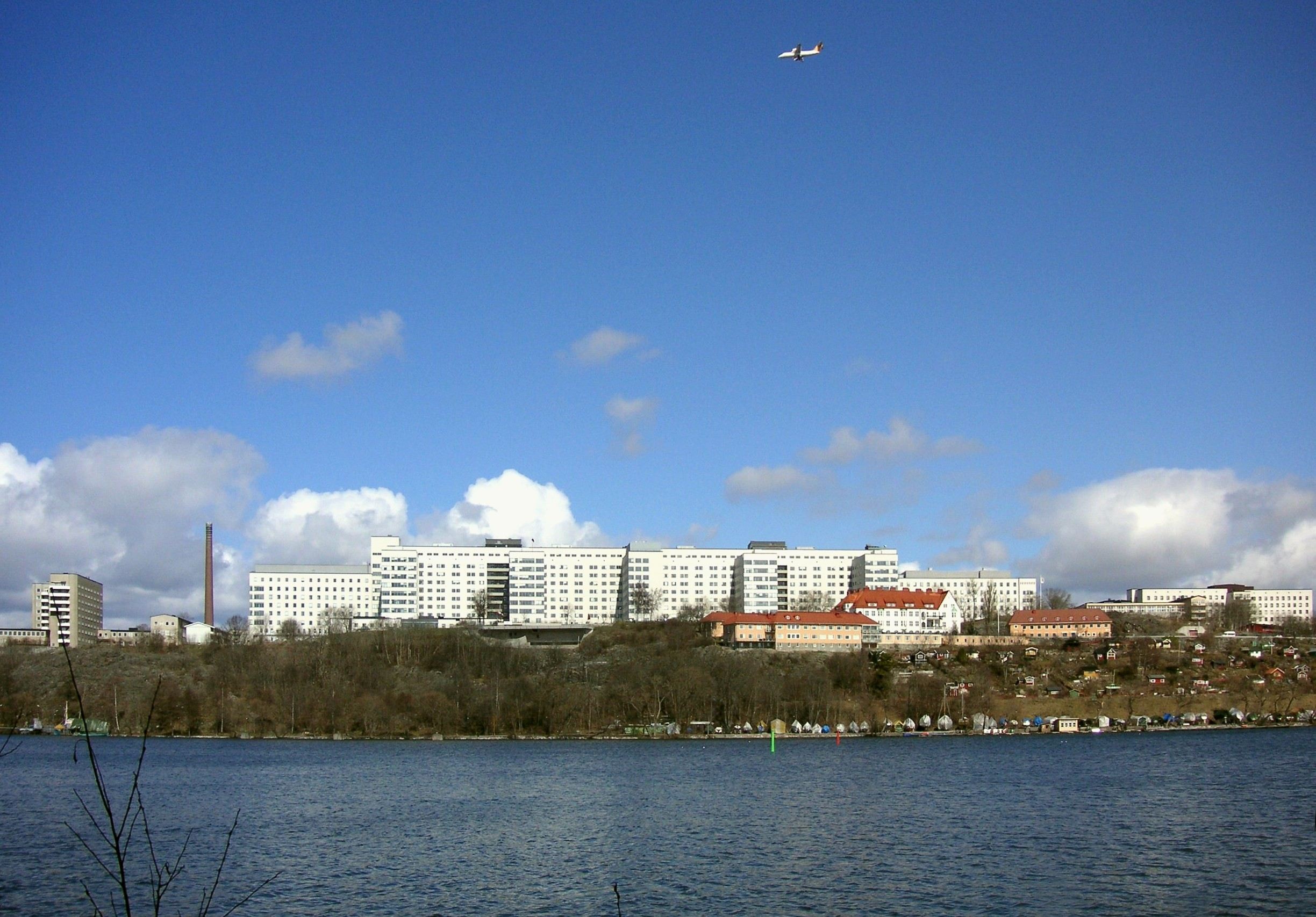 Södersjukhuset i april 2006, vy över Årstaviken